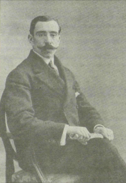 Lauerano Miró